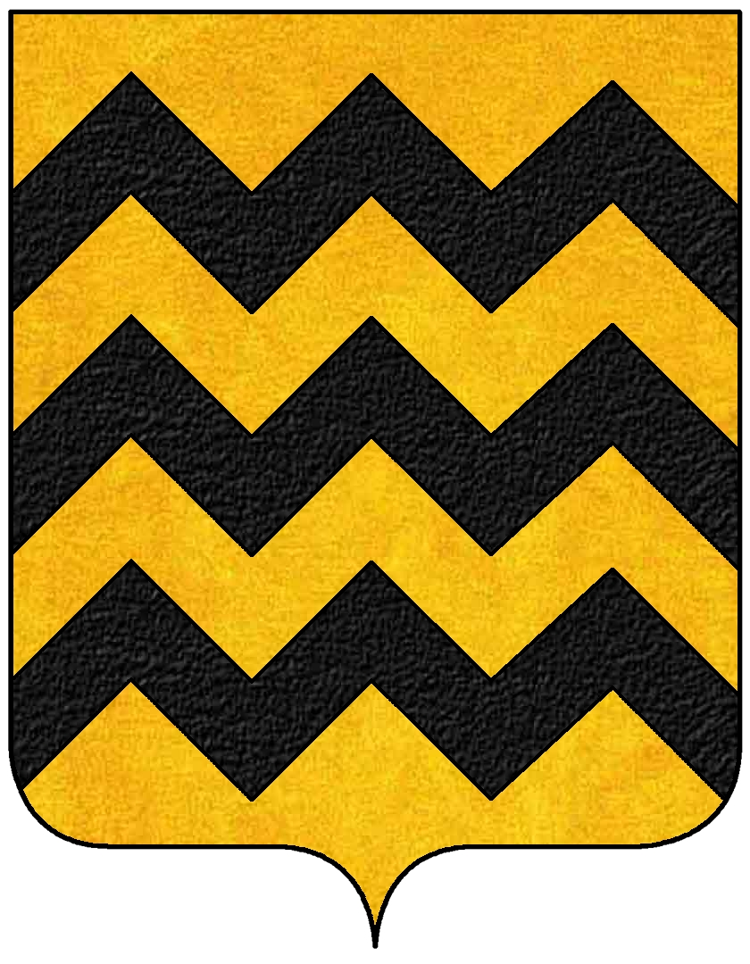 Stemma della famiglia Landi